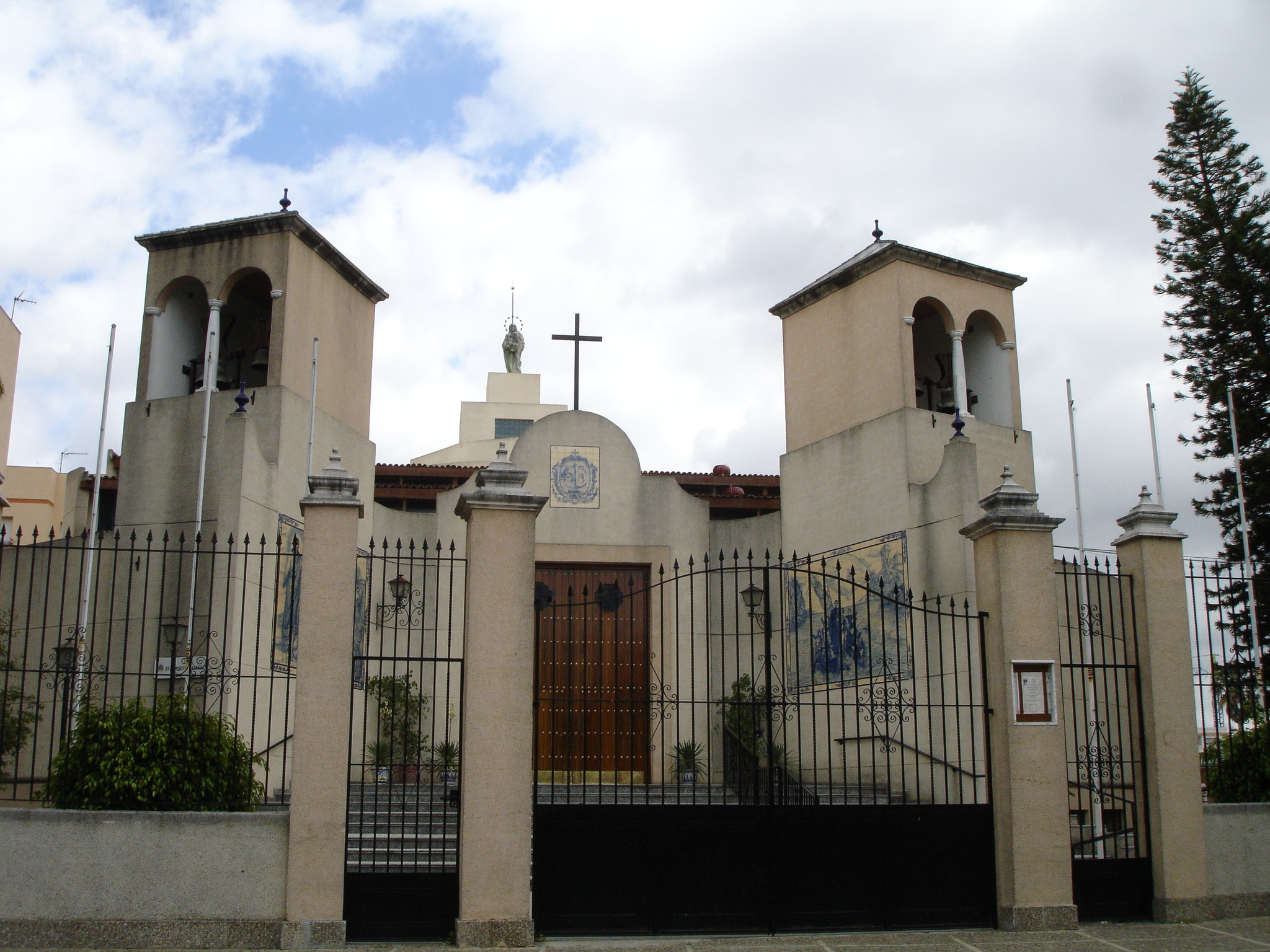 Iglesia en el Lora Tamayo, Jerez de la Frontera. Andalusia, Spain